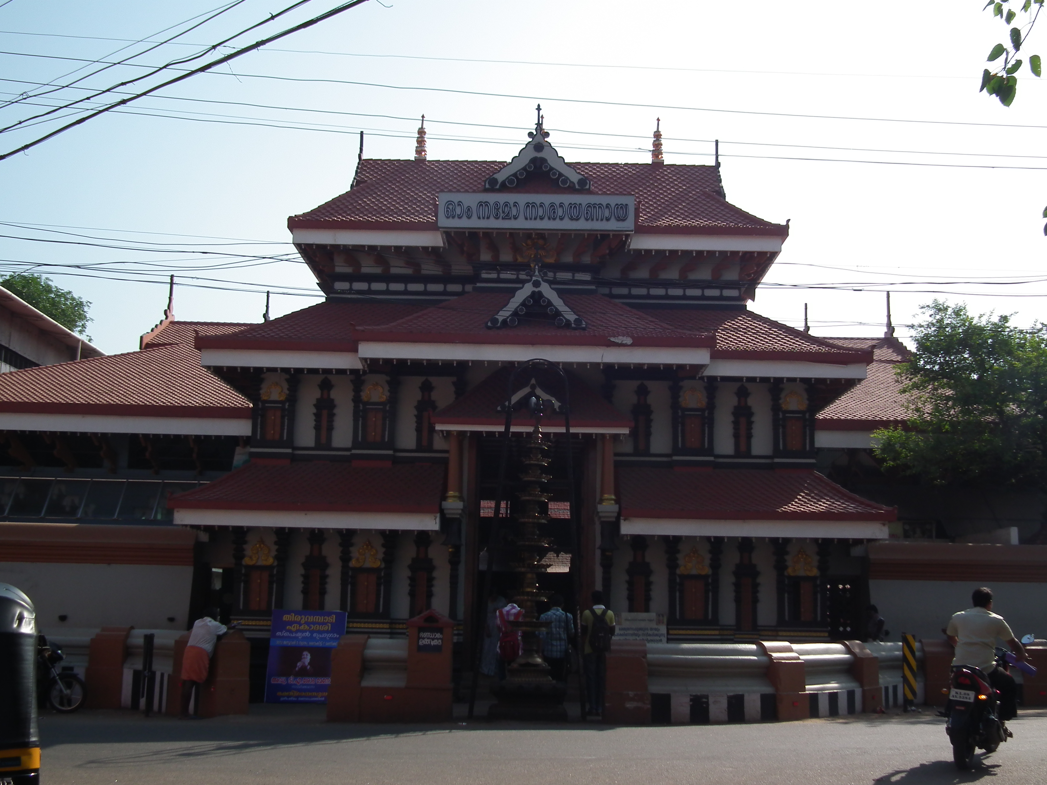 Thiruvambadi Sri Krishna Temple